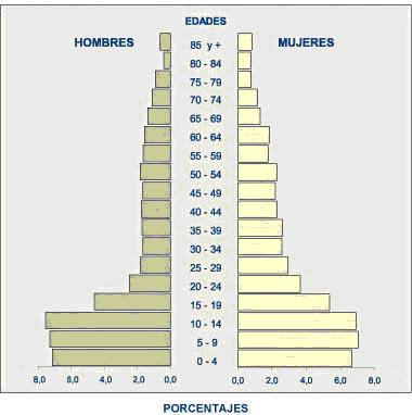 Piramide de población del Cantón Chunchi, en la provincia de Chimborazo en el Ecuador